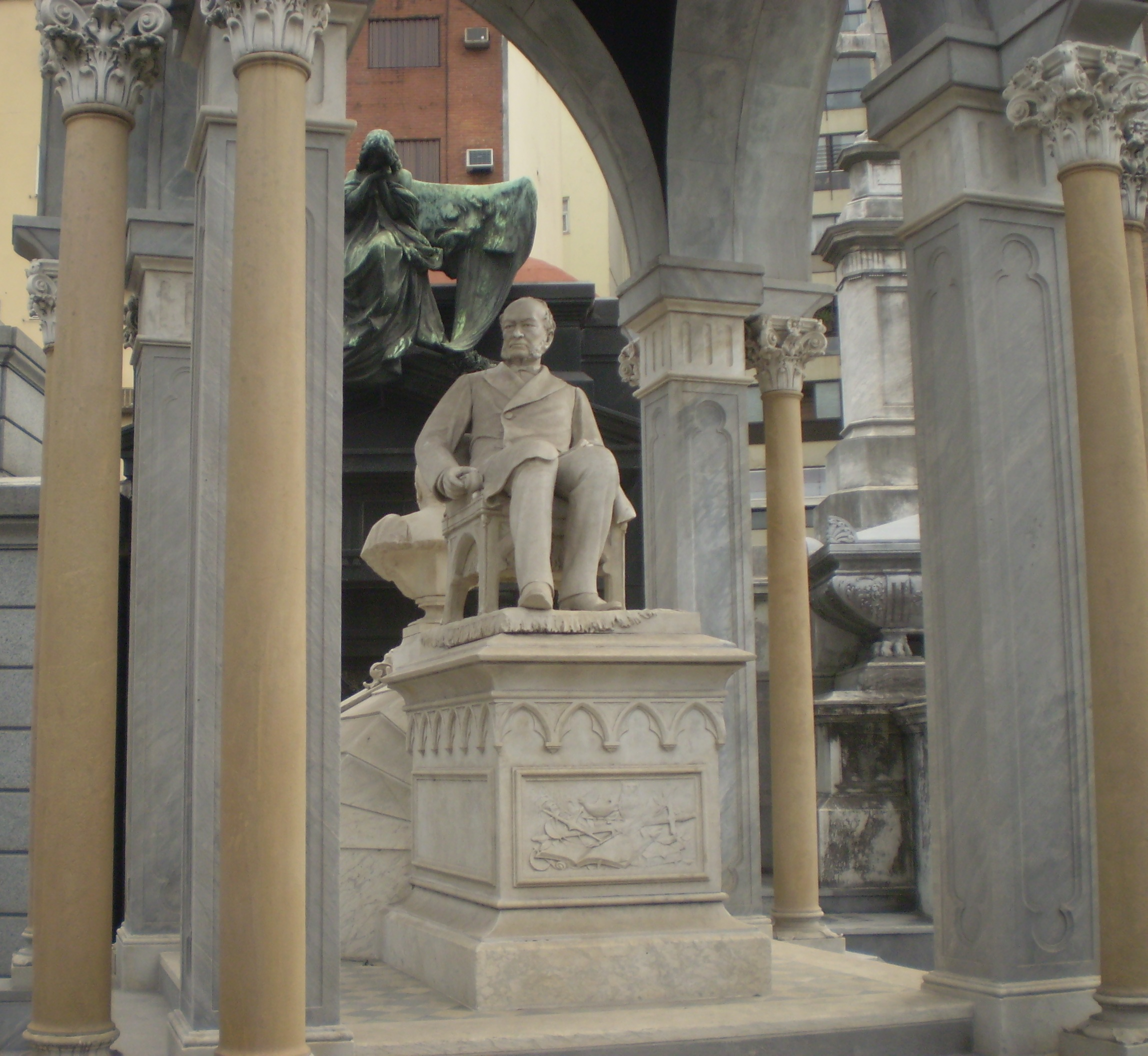 Monumento fúnebre de Salvador María del Carril, Cementerio de la Recoleta, Buenos Aires. (declarado Monumento Histórico Nacional)